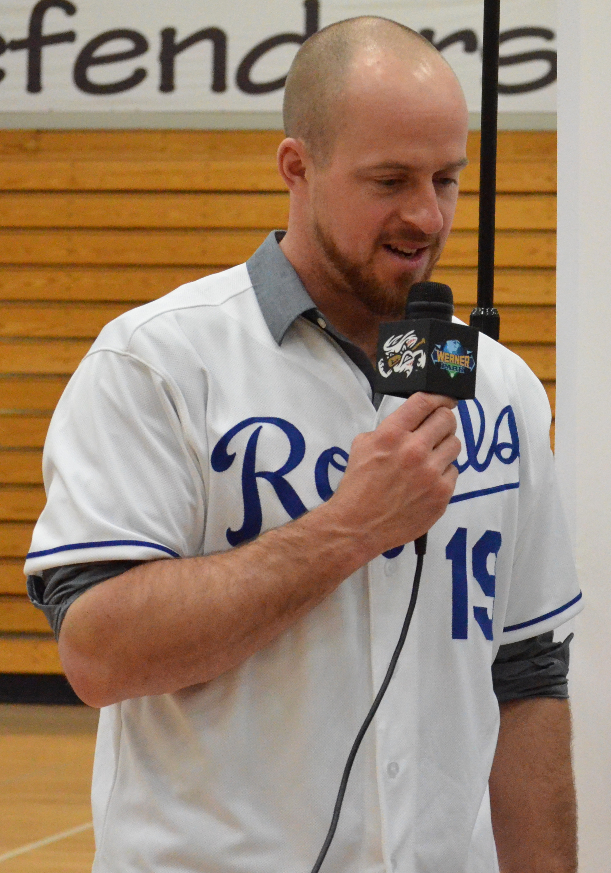 Erik Kratz